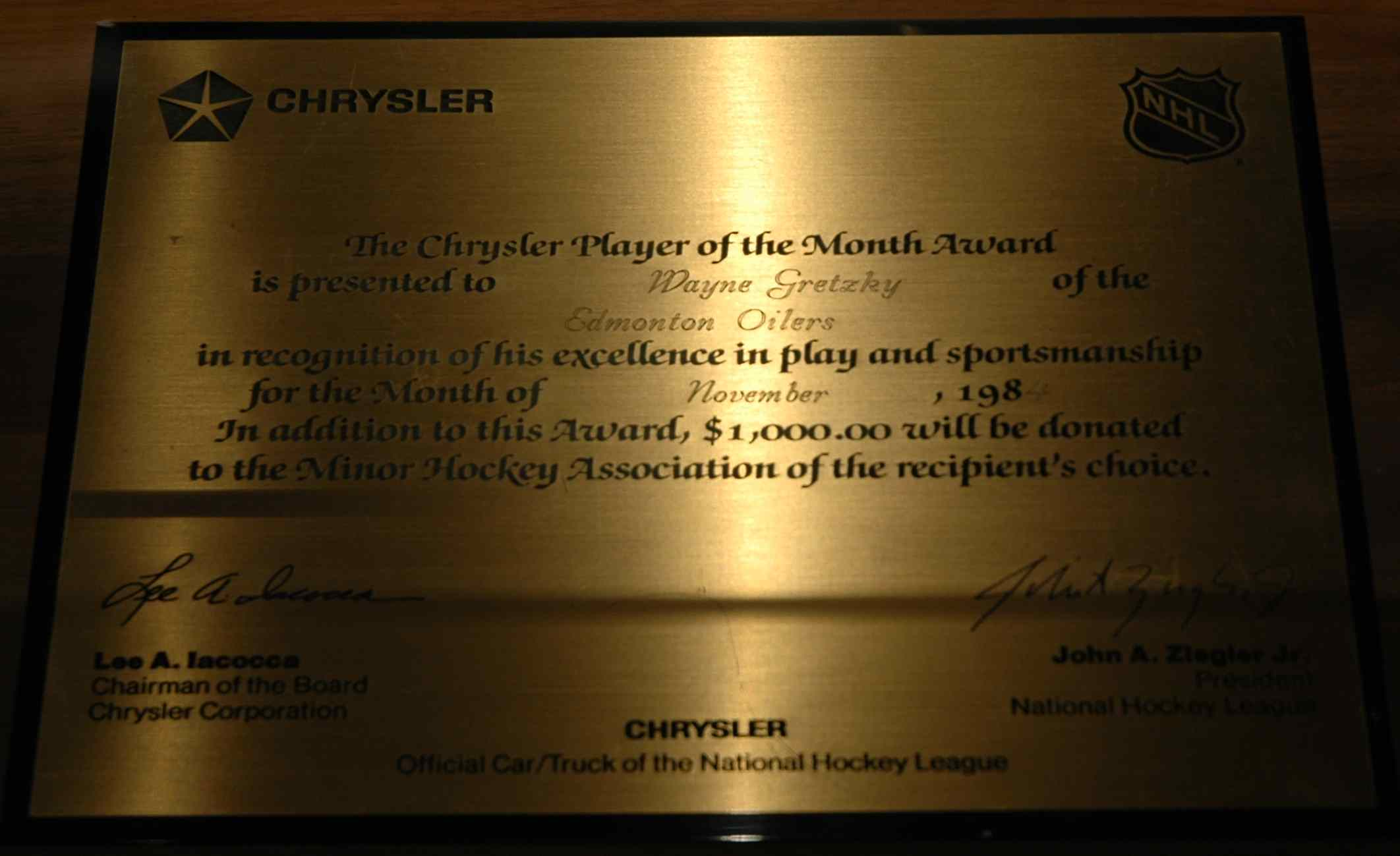 Ehrentafel für den NHL Player of the Month in der Hall of Fame in Toronto